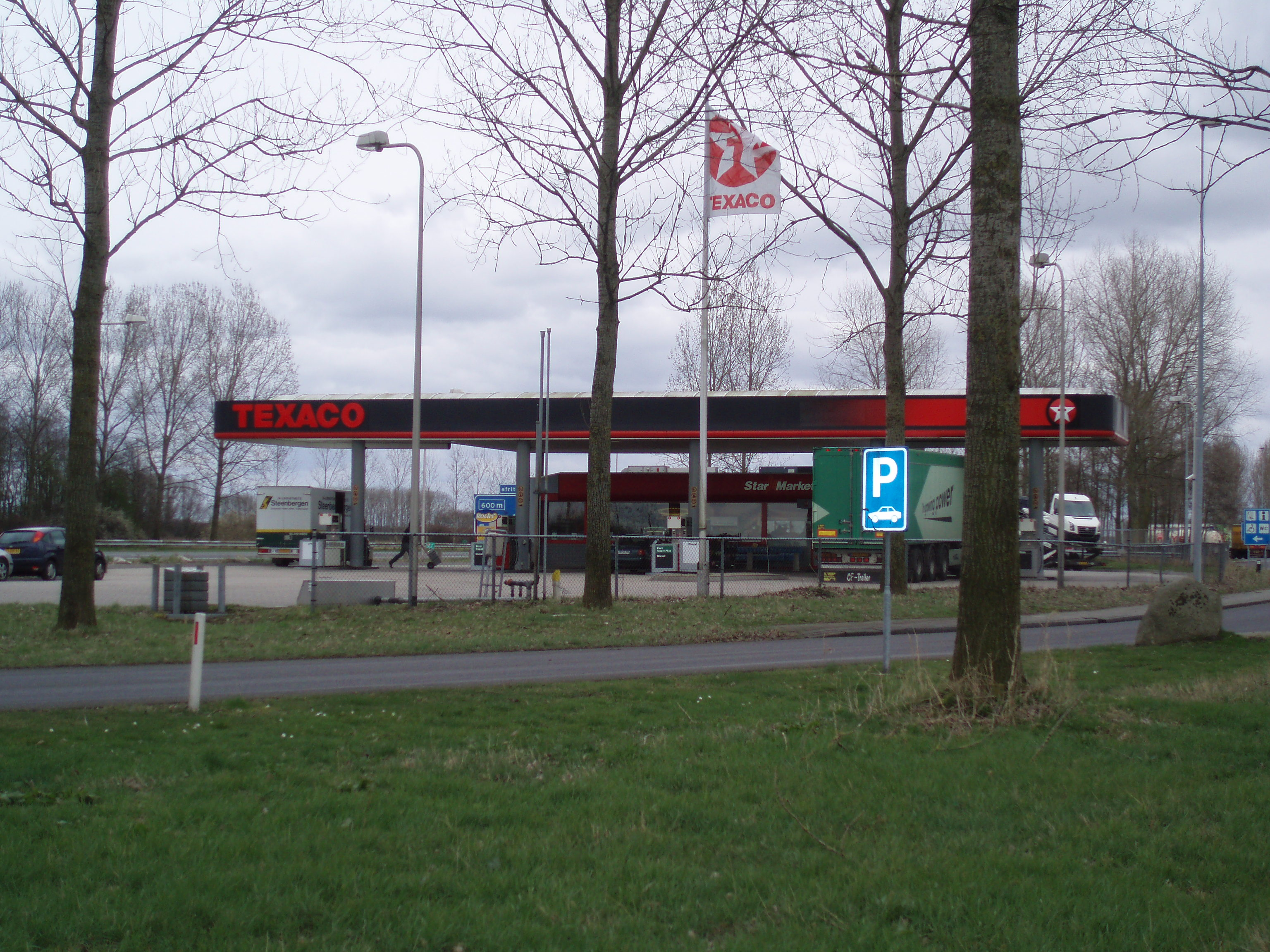 Verzorgingsplaats Lageveen aan de A28.